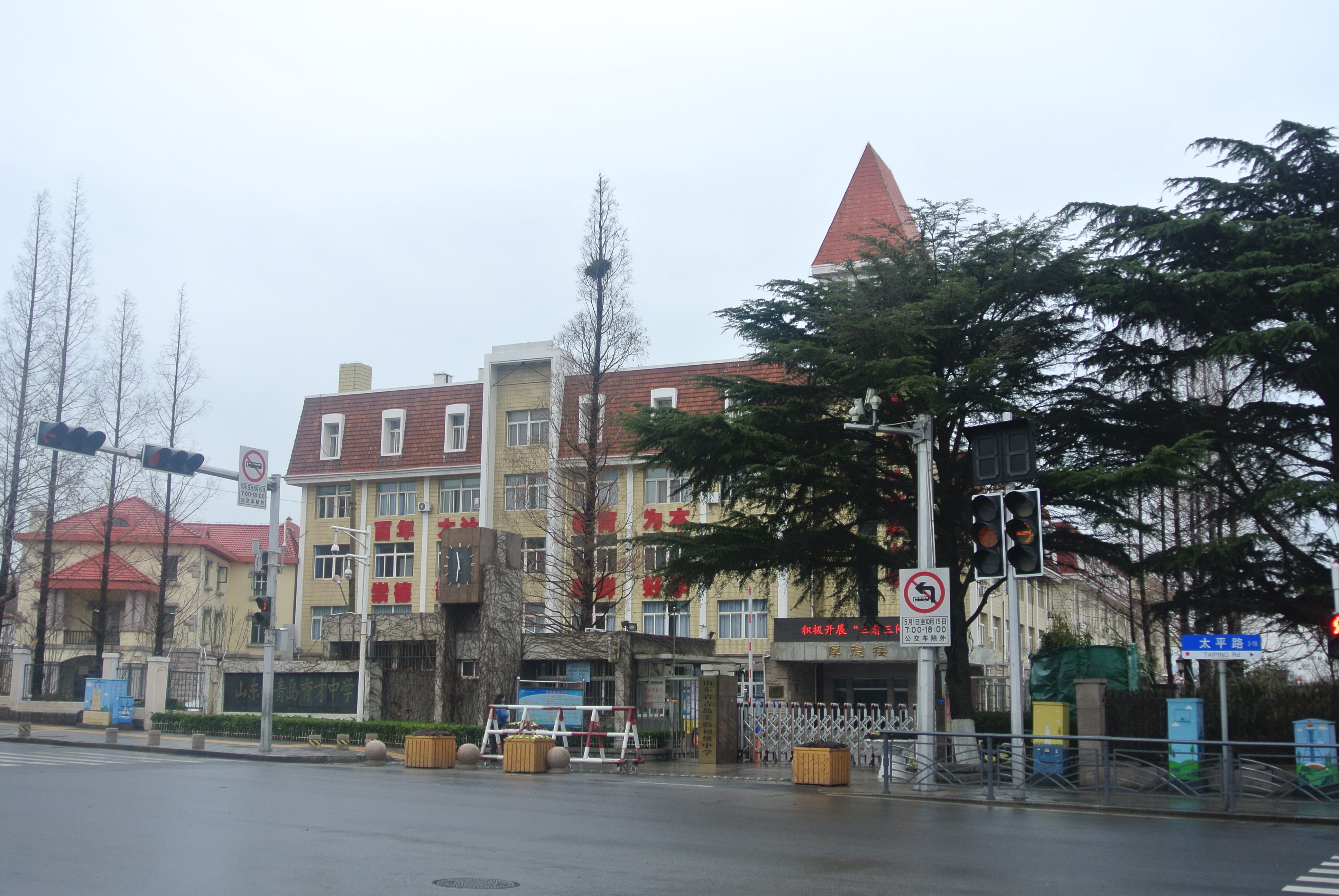 青岛实验初中正门